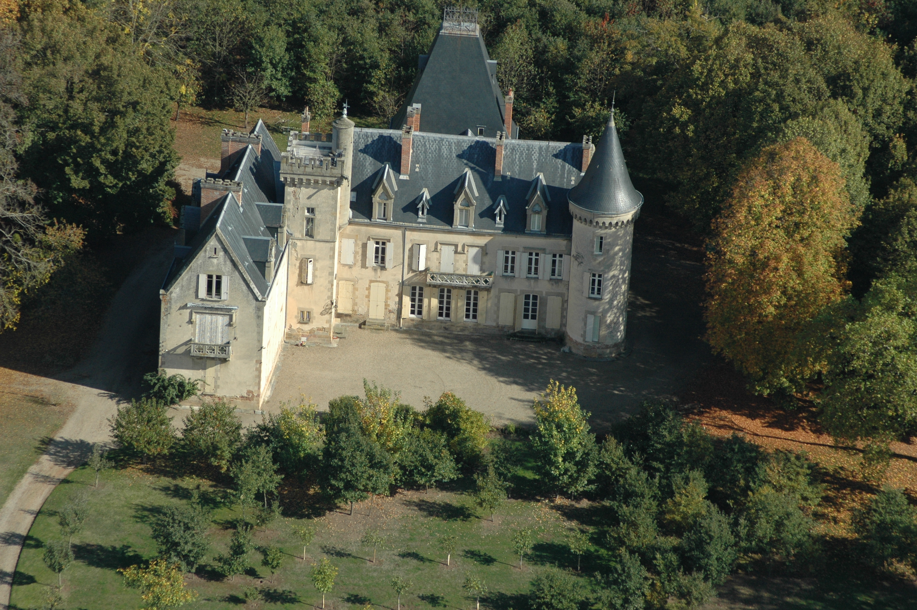 Le château du Colombier à Toulon-sur-Allier, France.